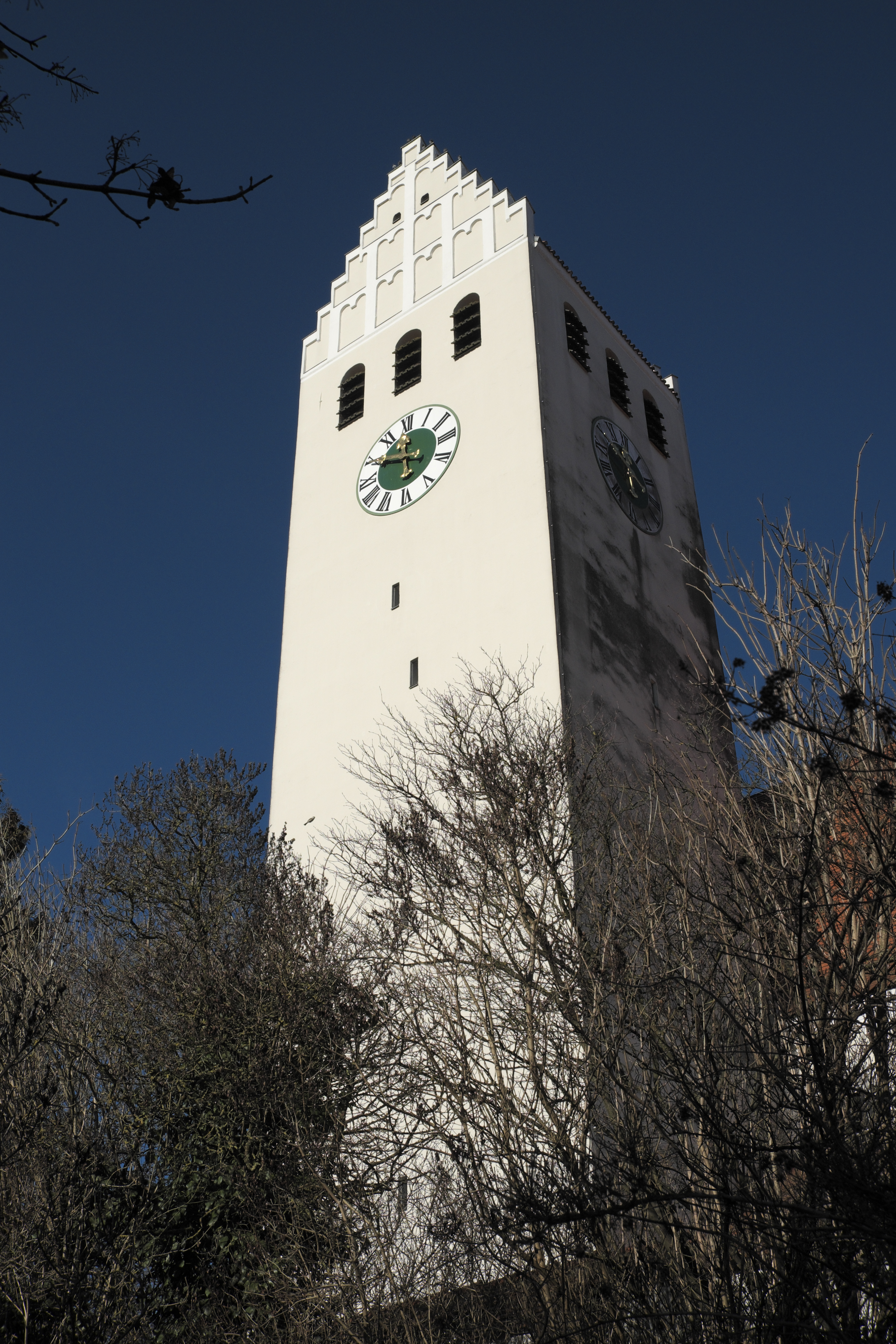 Katholische Pfarr-, ehemalige Kollegiatsstiftskirche St. Arsatius in Ilmmünster im Landkreis Pfaffenhofen an der Ilm (Bayern/Deutschland), Kirchturm